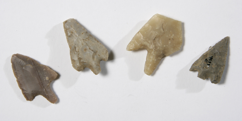 Punte di freccia in selce con peduncolo e spalle o con peduncolo e alette per cacciare, ma anche per uso bellico. Prodotto della scheggiatura della pietra.